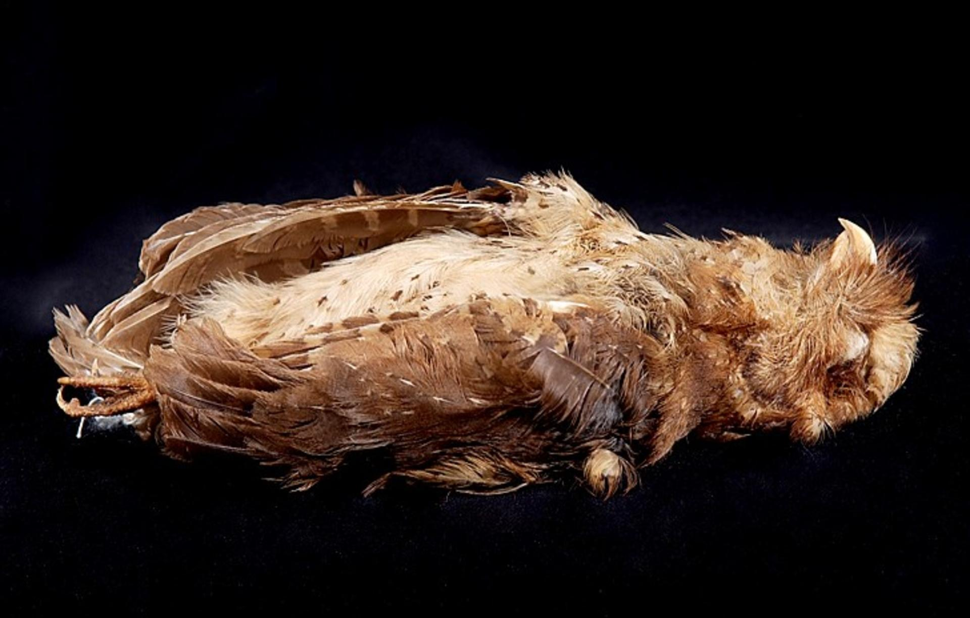 Otus rufescens Horsfield, 1821